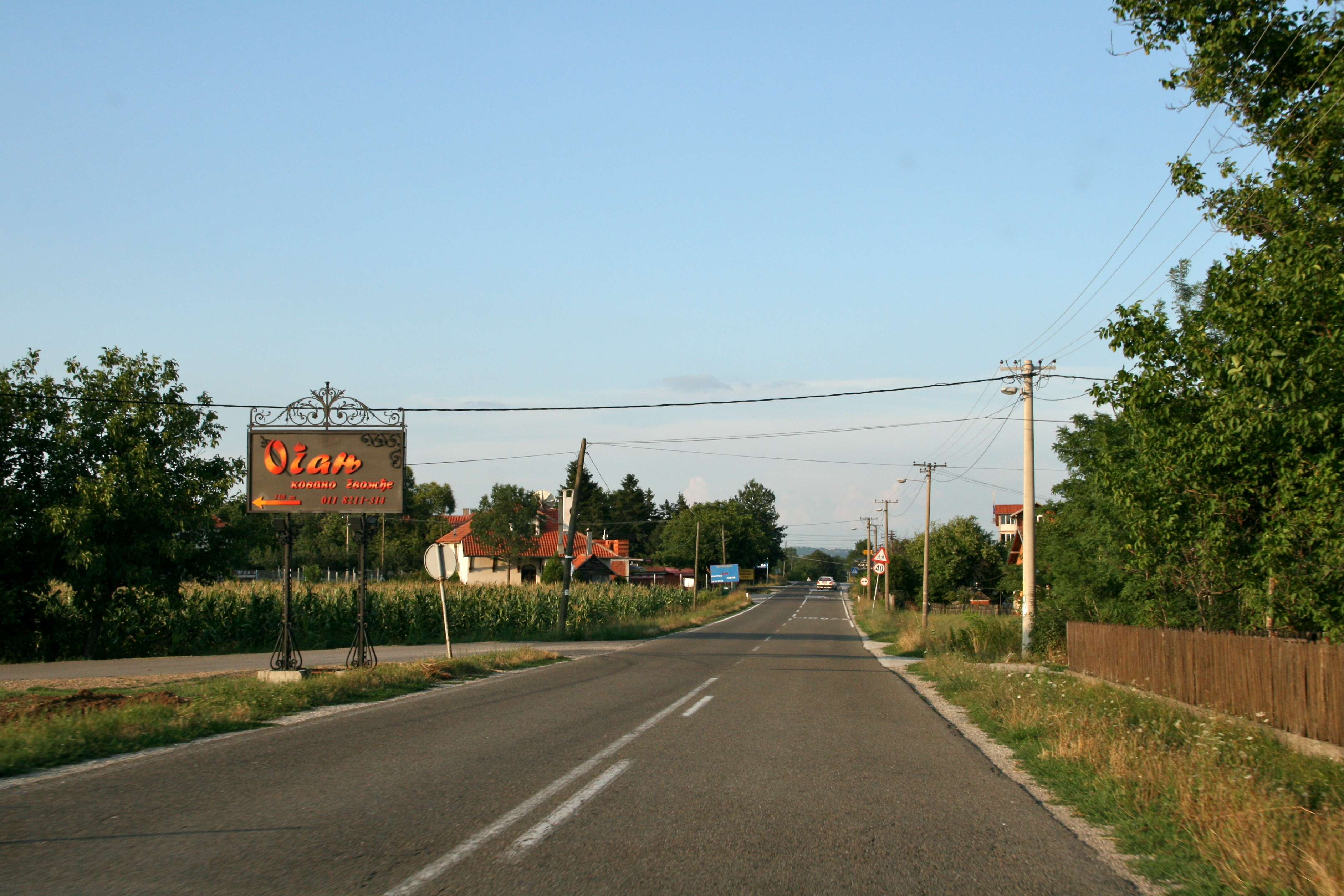 Марковац (Младеновац)